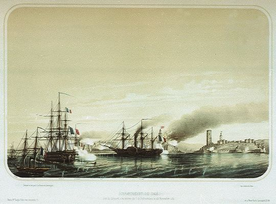 Bombardement de Sale par la Division aux ordres du C.A. Dubourdieu le 26 Novembre 1851